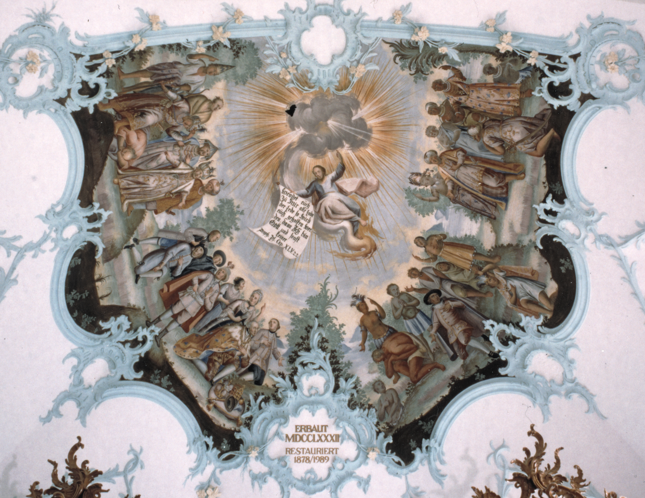 Chorgemälde mit den vier Erdkreisen in der Reformierten Kirche in Trogen (erb. 1779-1782)